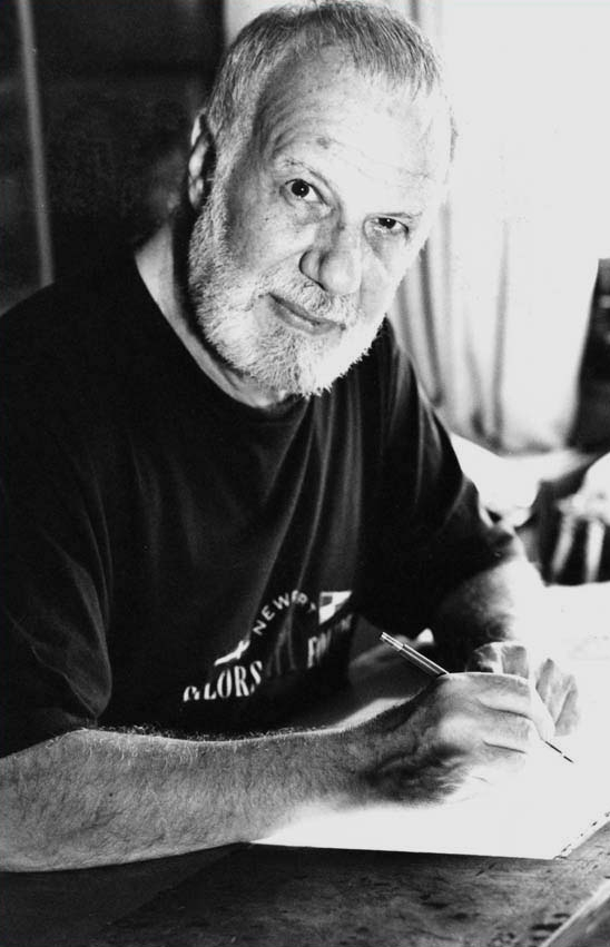 Leone Cimpellin, disegnatore di fumetti. Ritratto fotografico di Joe Zattere (Fumetti d'Italia), 1993